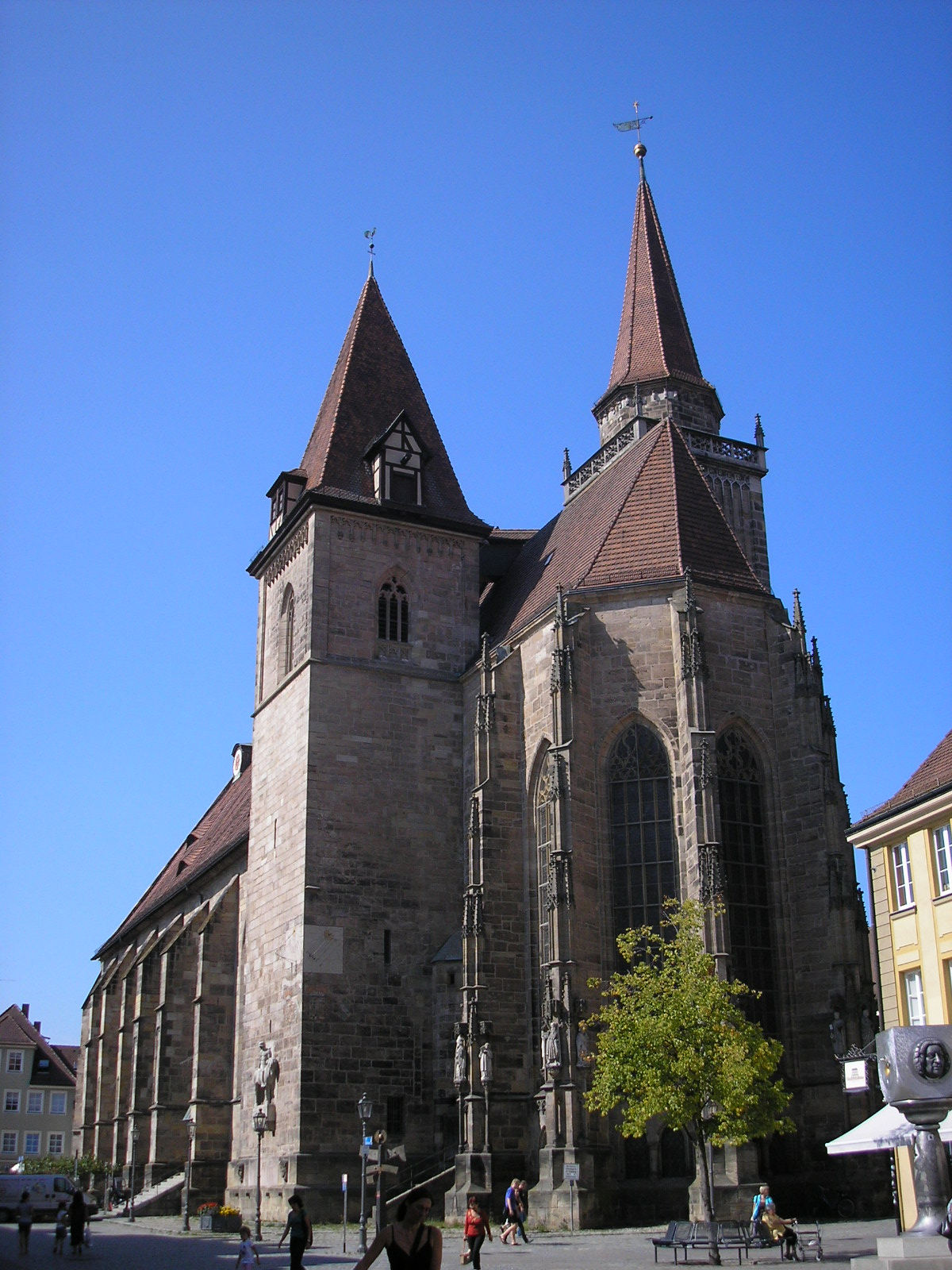 Die Johanniskirche in Ansbach (Mittelfranken).